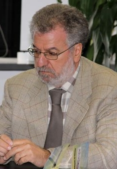 Pantaleone Sergi